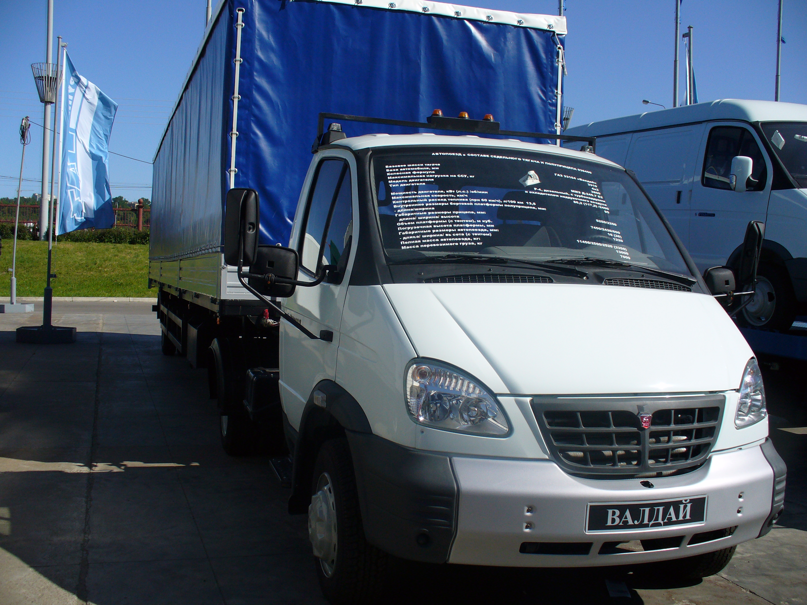 ГАЗ-33104В «Валдай»